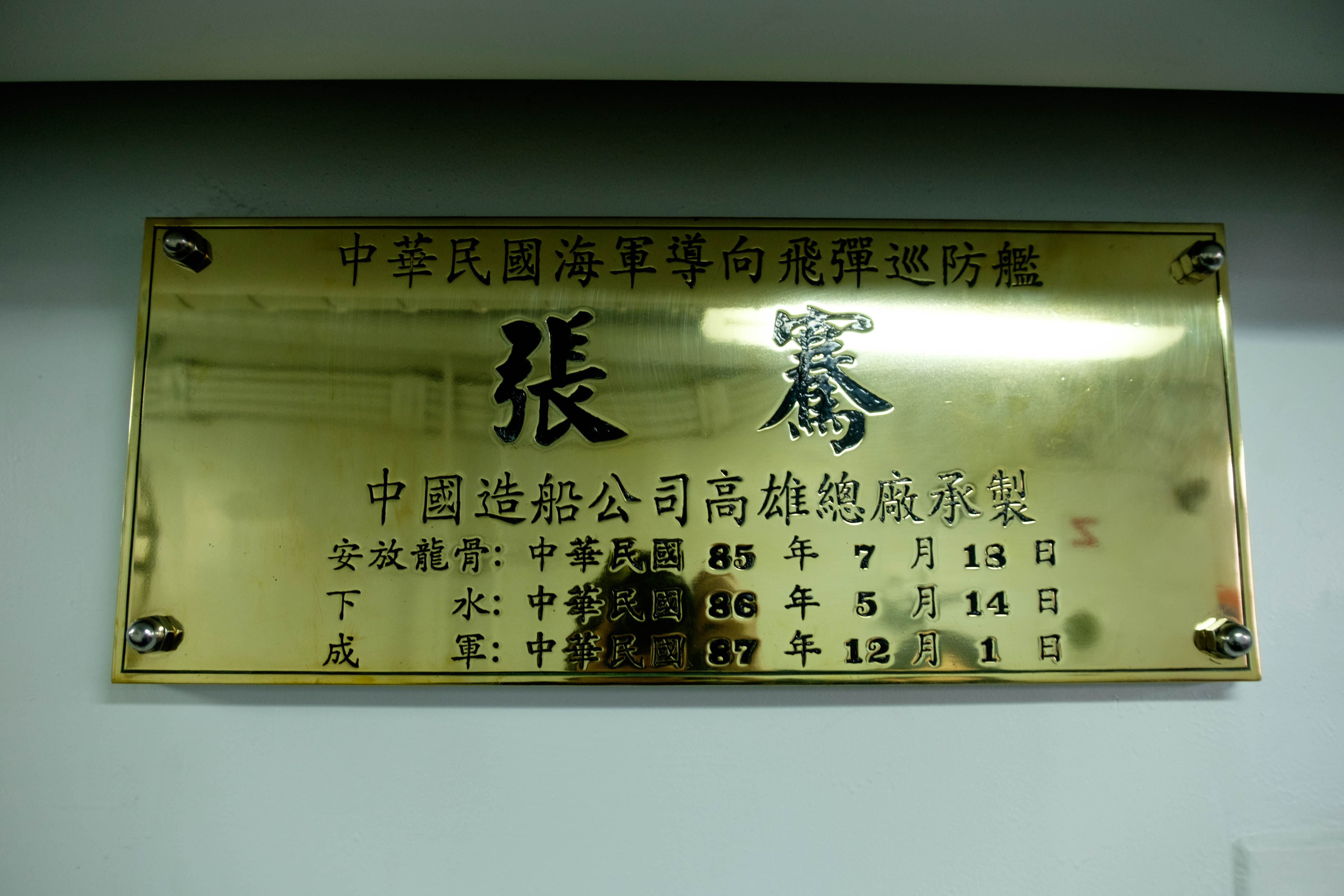 中文（台灣）: 飛彈巡防艦張騫（PFG2-1109）中央通道左舷側壁上的艦名銘牌。